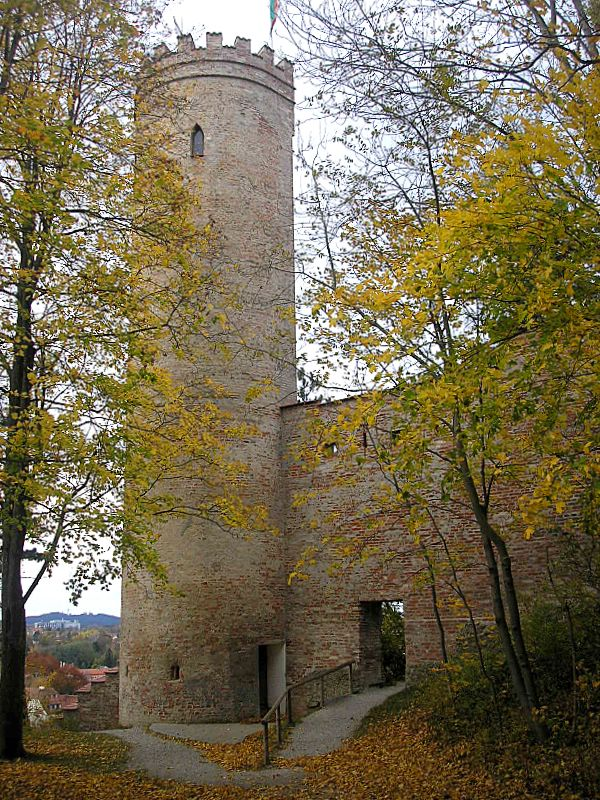 Landsberg am Lech (Oberbayern). Stadtmauer, „Jungfernsprung“ auf der südlichen Hangkante. Eigene Aufnahme, Okt. 2006 / Landsberg am Lech (Upper Bavaria, Germany). City wall, „Jungfernsprung“ ( “Jump of the virgins”) watchtower. Own photo, Oct. 2006.